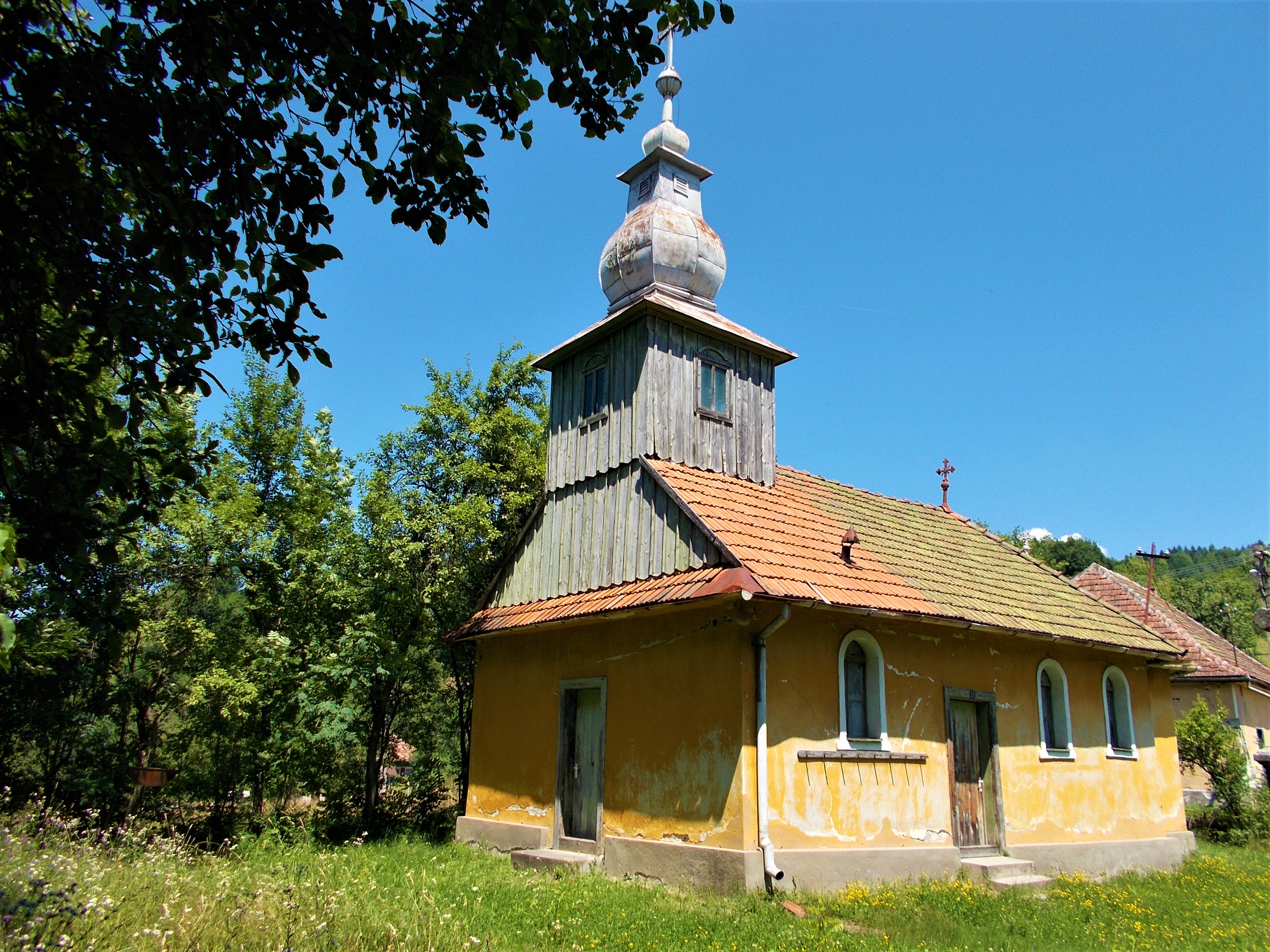 Biserica de lemn din satul Groși, județul Arad